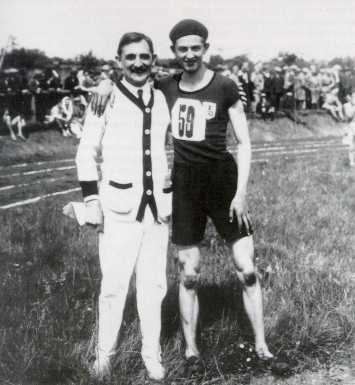 Joseph et Guy Gemain à Courtemanche